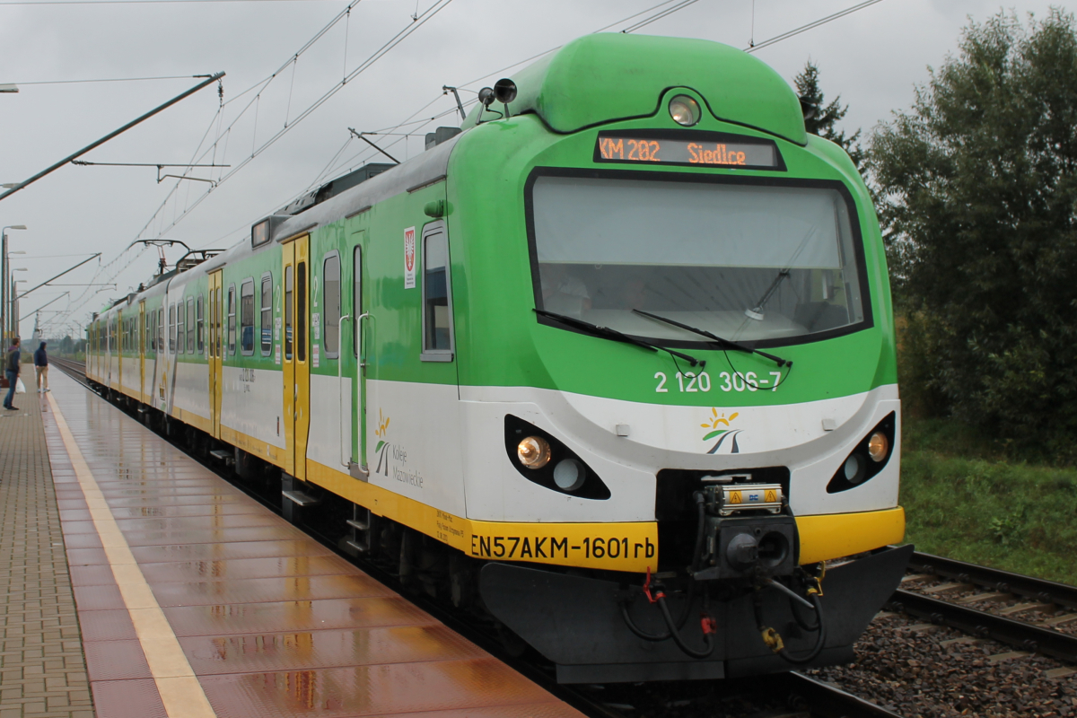 Elektryczny zespół trakcyjny EN57AKM-1601 stoi na przystanku Siedlce Wschodnie. This photo was taken during Railway Wikiexpedition 2014 set up by Wikimedia Polska Association in cooperation with Fundacja Grupy PKP. You can see all photographs in category Wikiekspedycja kolejowa 2014.